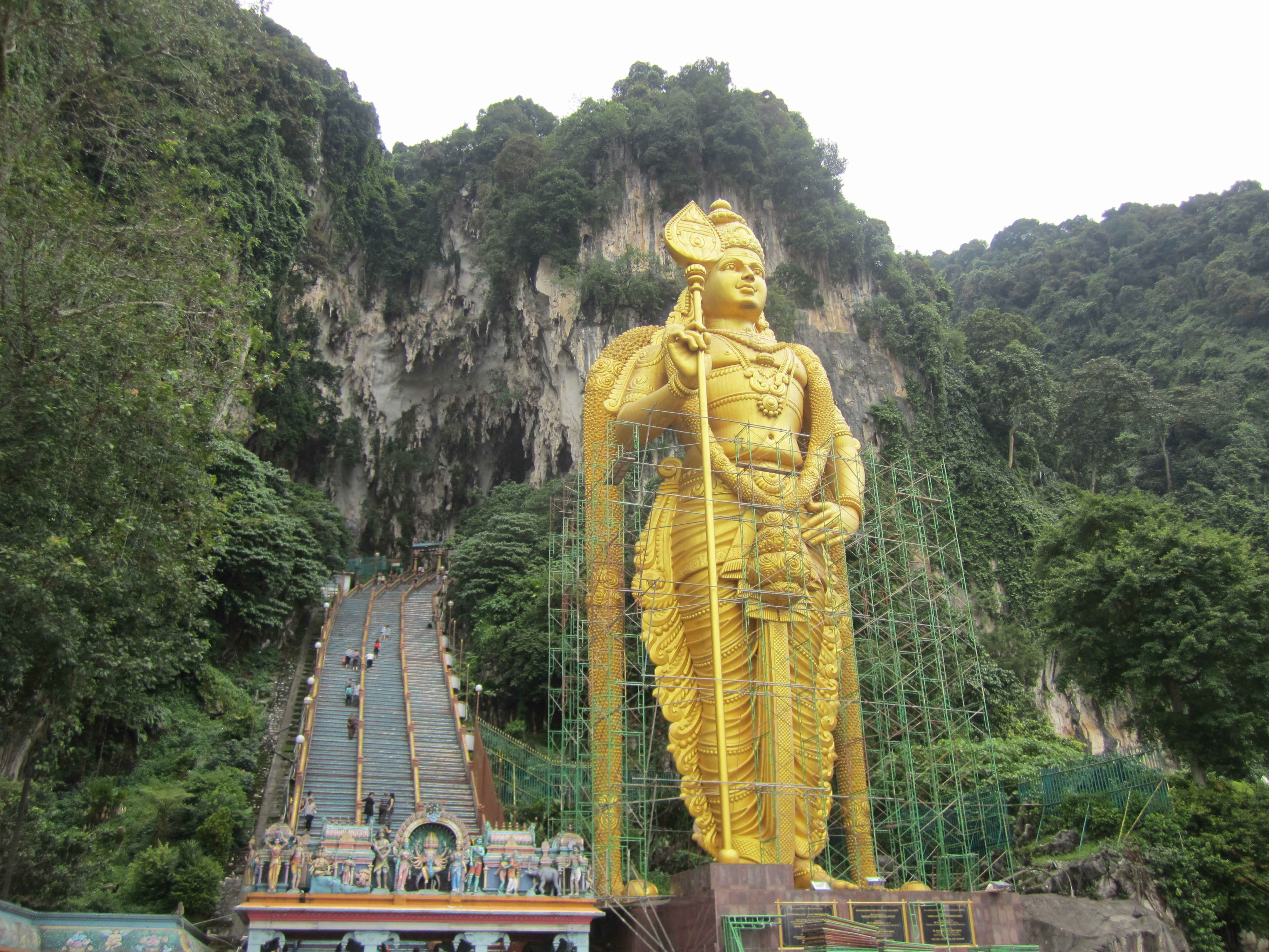 Murugan at Batu Caves located in Gombak district, north of Kuala Lumpur.